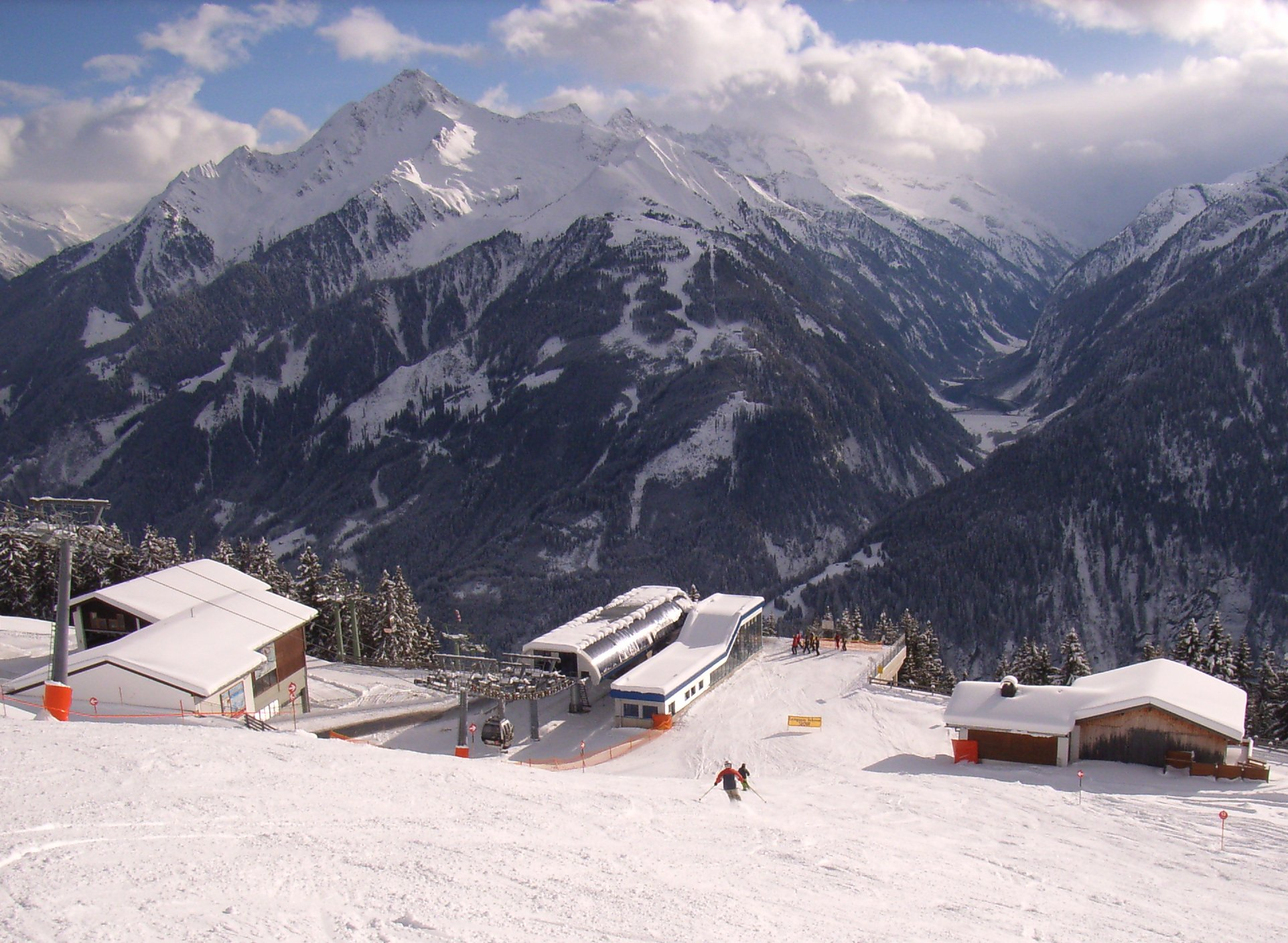 Die Mittelstation der auf den Penken führenden Finkenberger Almbahn